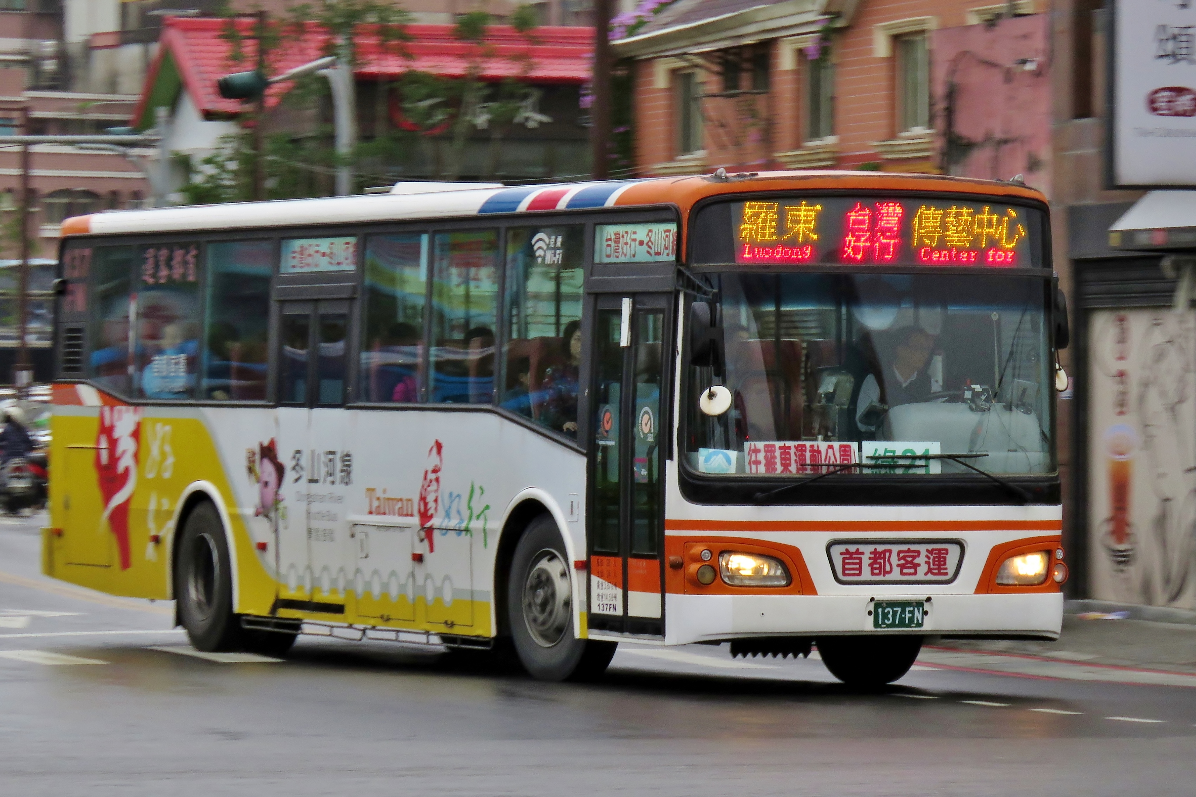 首都客運2008年日野RK8JRSA大客車137-FN 臺灣好行冬山河線塗裝 宜蘭縣公車綠21路 傳藝中心→羅東運動公園